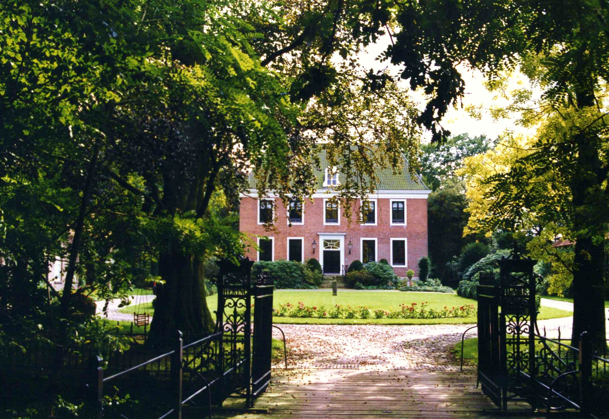 De brug naar het voorplein van huis Herinckhave te Fleringen.